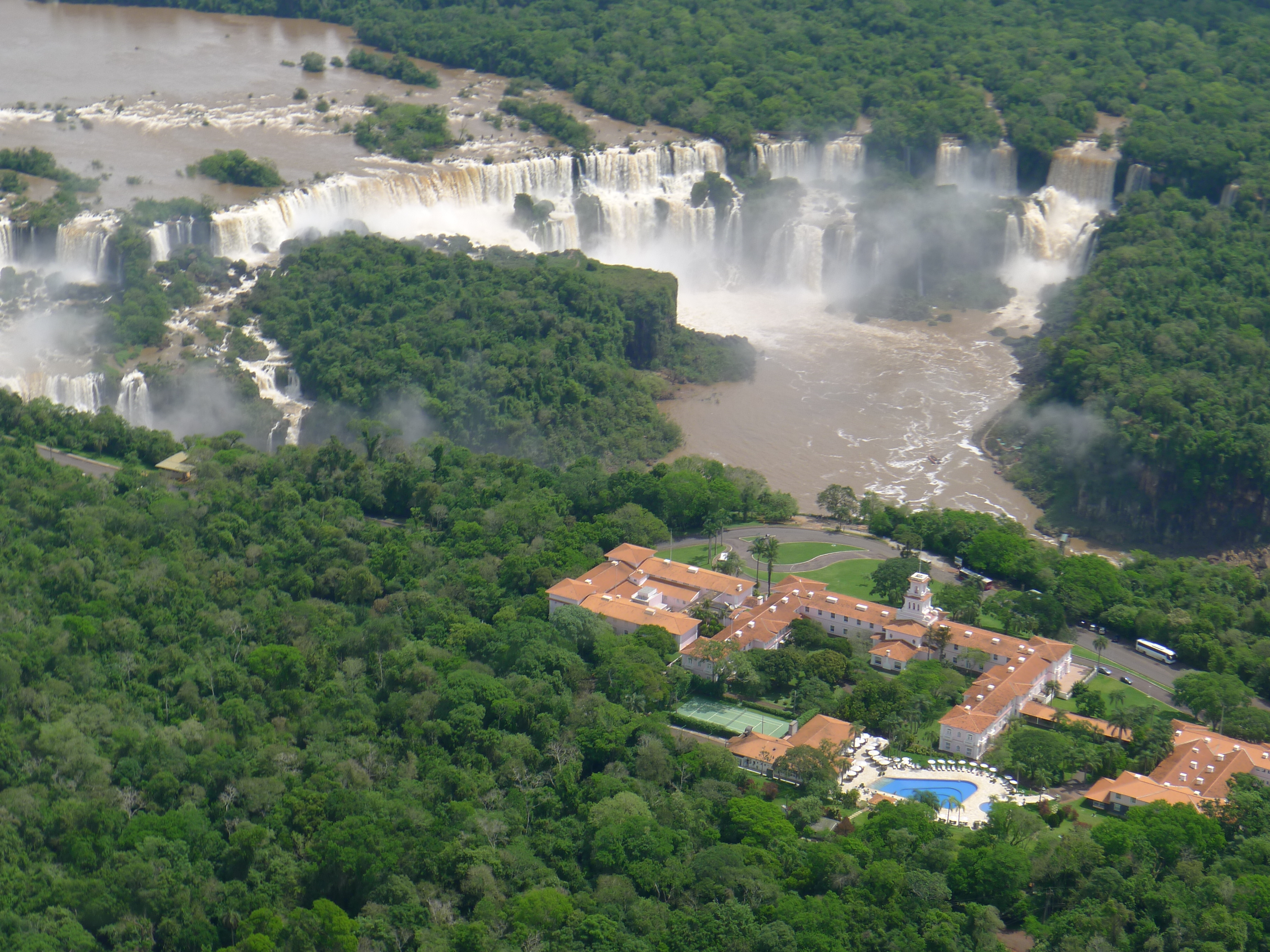 Водопады Игуасу в Бразилии, с вертолета.